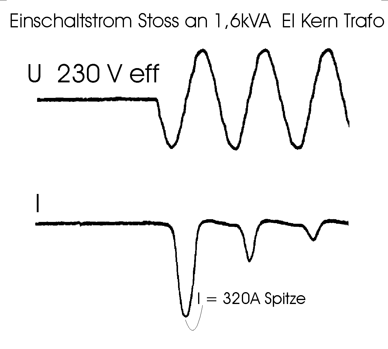 Einschaltstrom-stoss